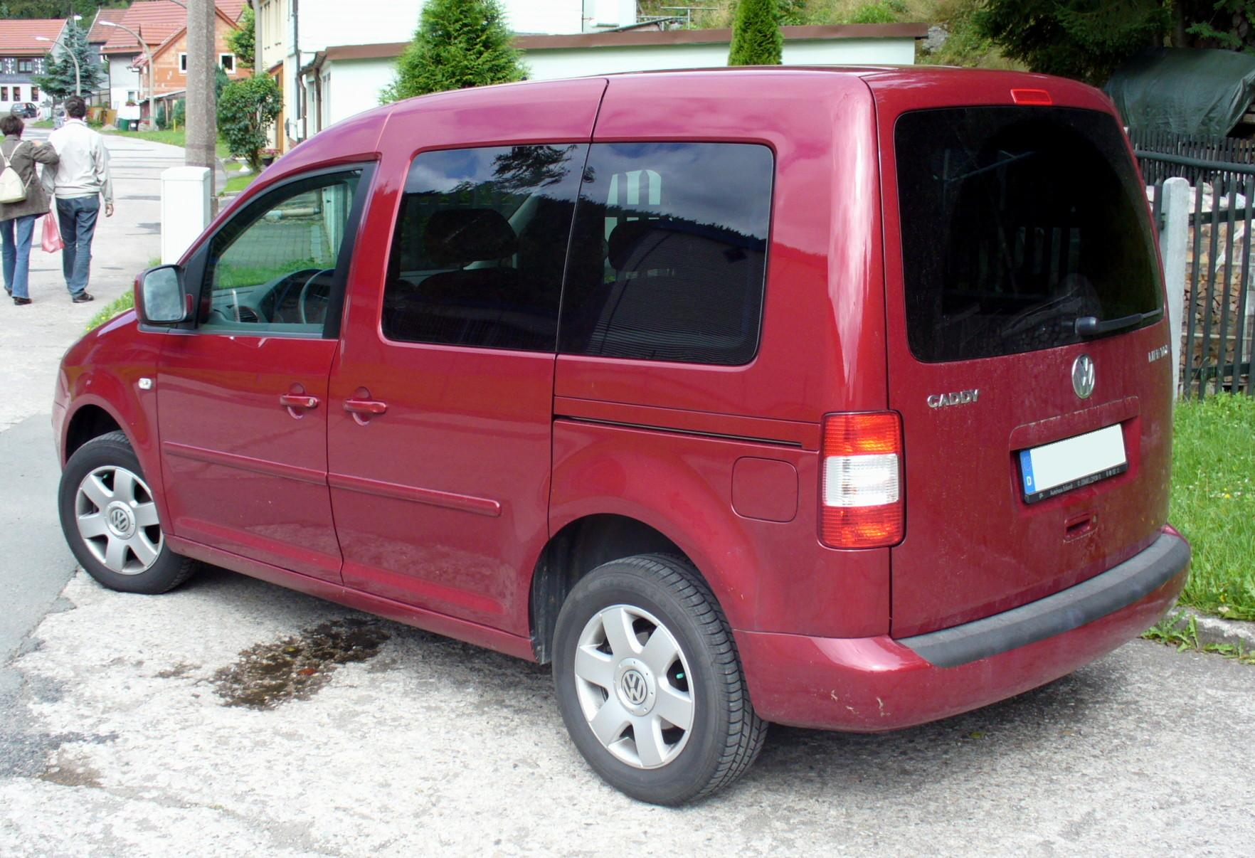 VW Caddy